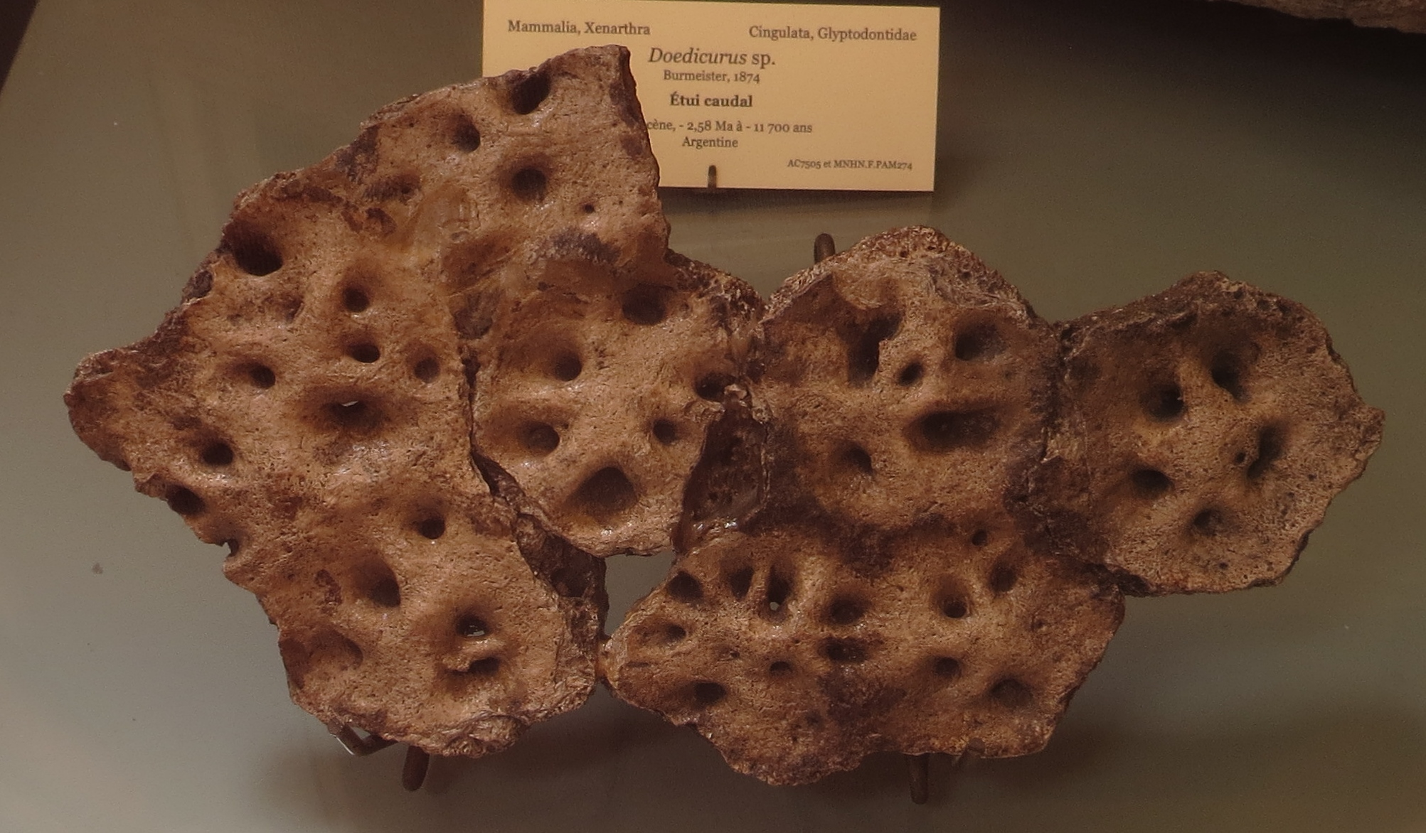 Doedicurus fossil plates